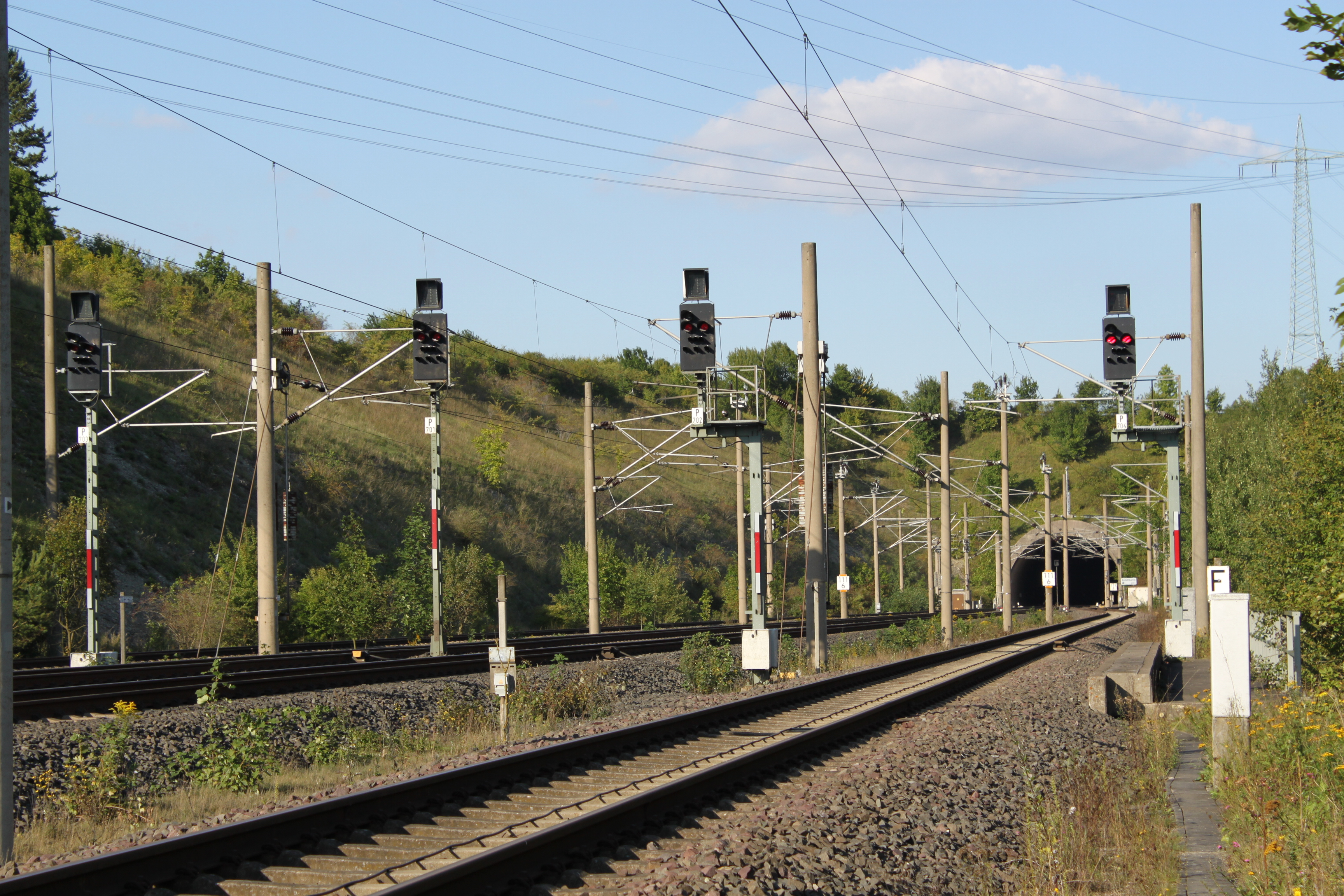 Überholbahnhof Jühnde